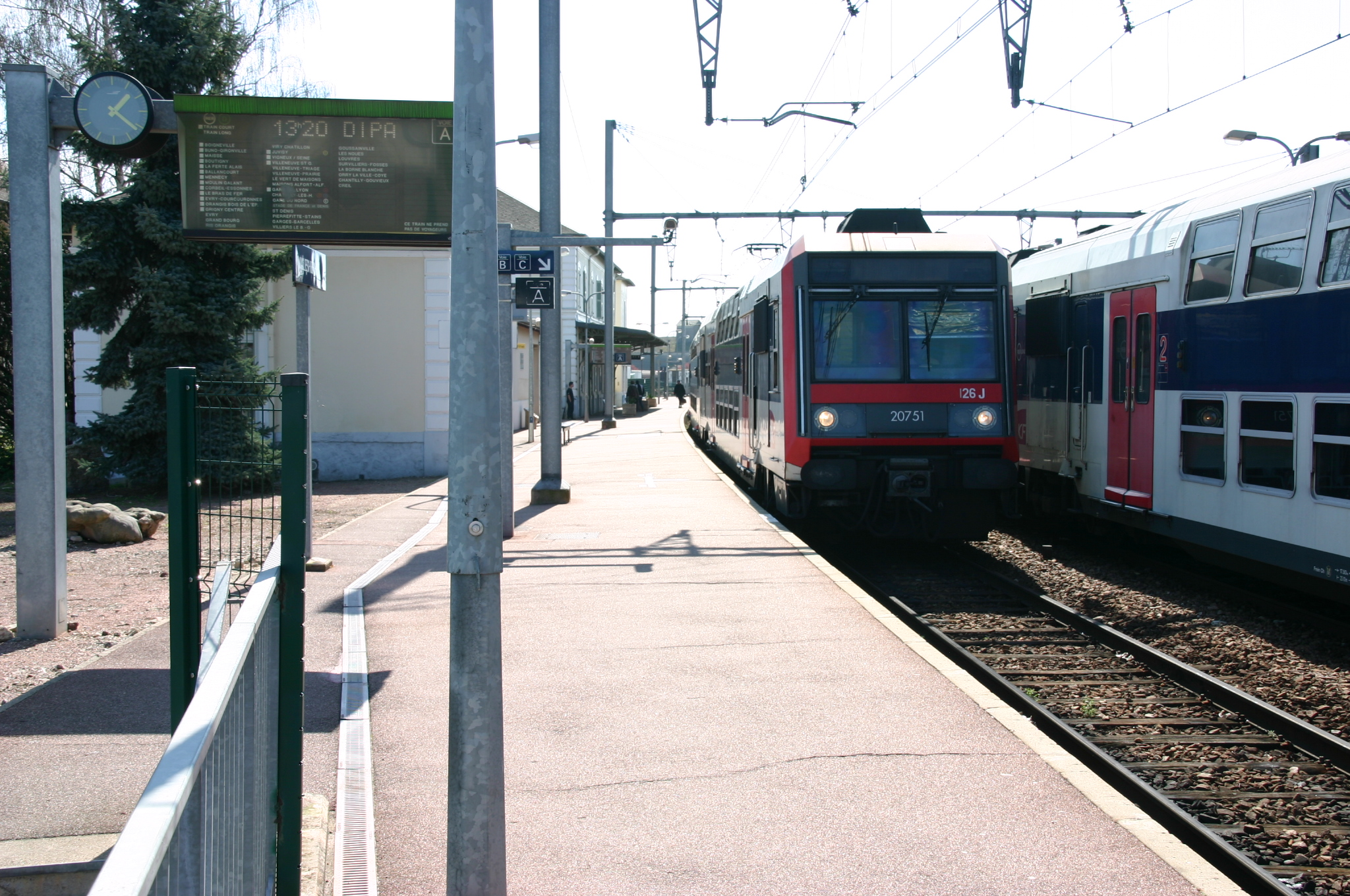 Gare de Malesherbes, Loiret (France)